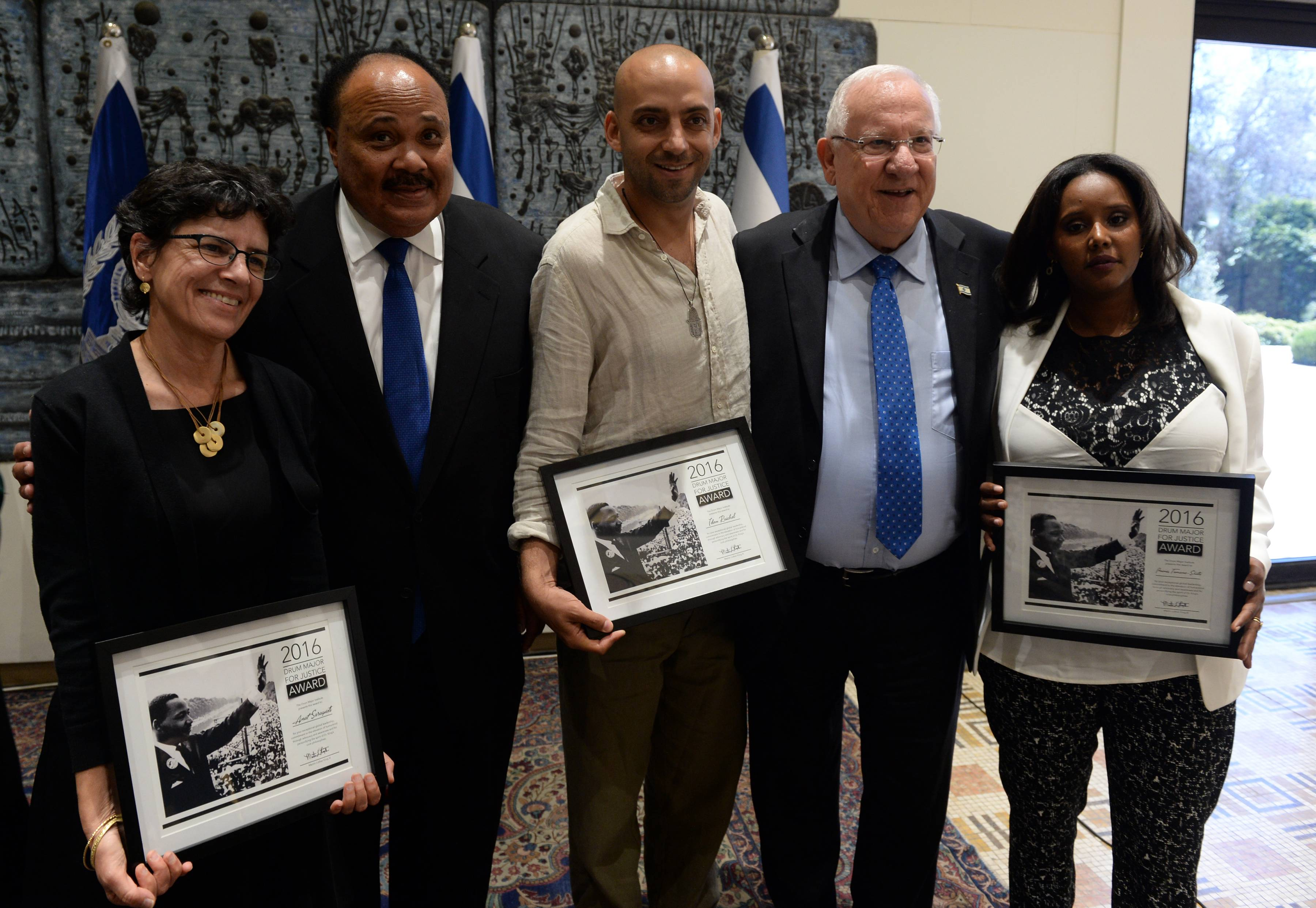 מרטין לותר קינג השלישי בביקור אצל ראובן ריבלין בבית נשיא מדינת ישראל מעניק אות הערכה לעידן רייכל, פנינה תמנו שטה וענת סרגוסטי על פעילותם למען זכויות אדם.